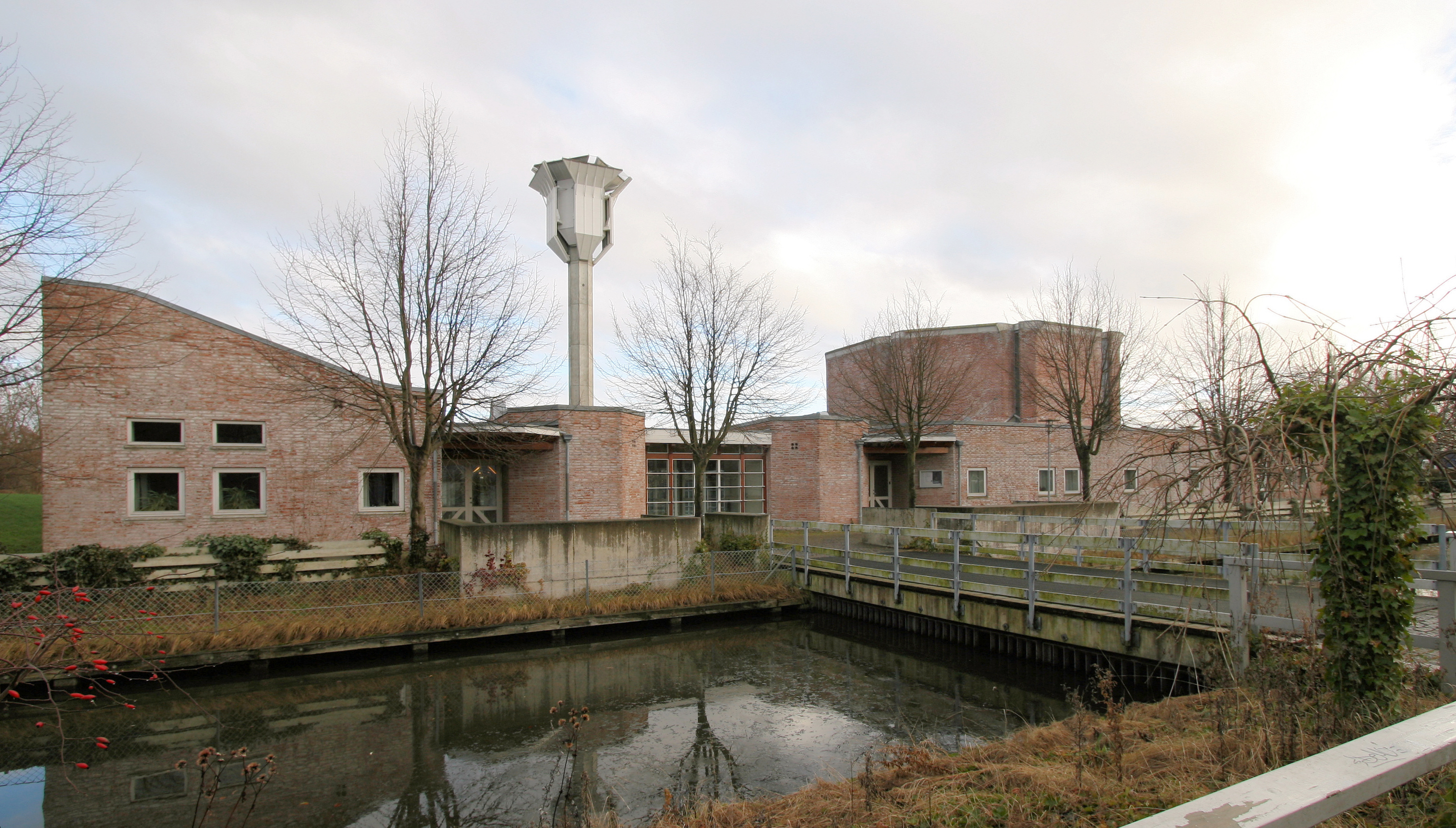 Opstandelseskirken, Albertslund, Denmark Opstandelseskirken